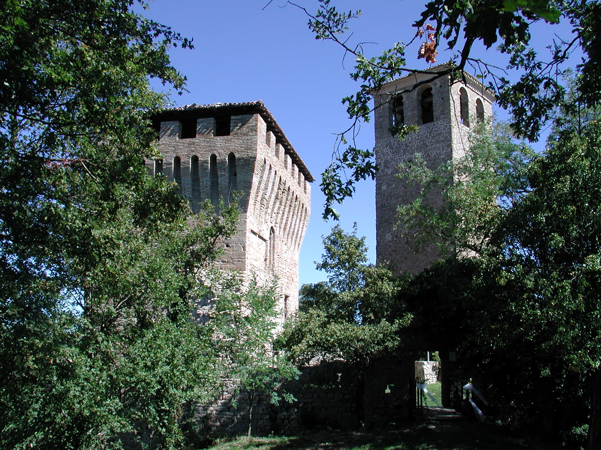 Castello di Sarzano, Casina, italy